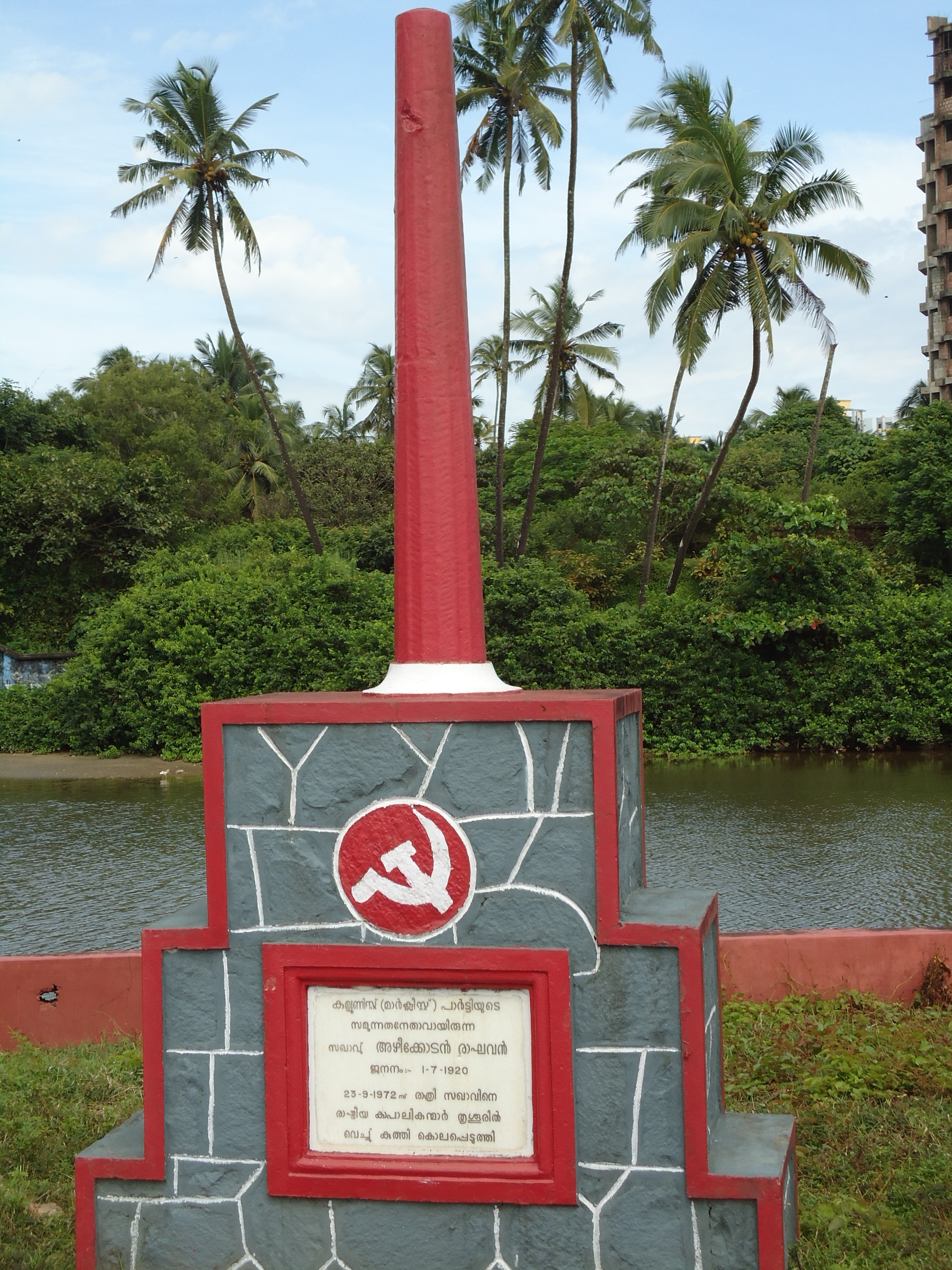 അഴീക്കോടൻ രാഘവന്റെ ശവകുടീരം